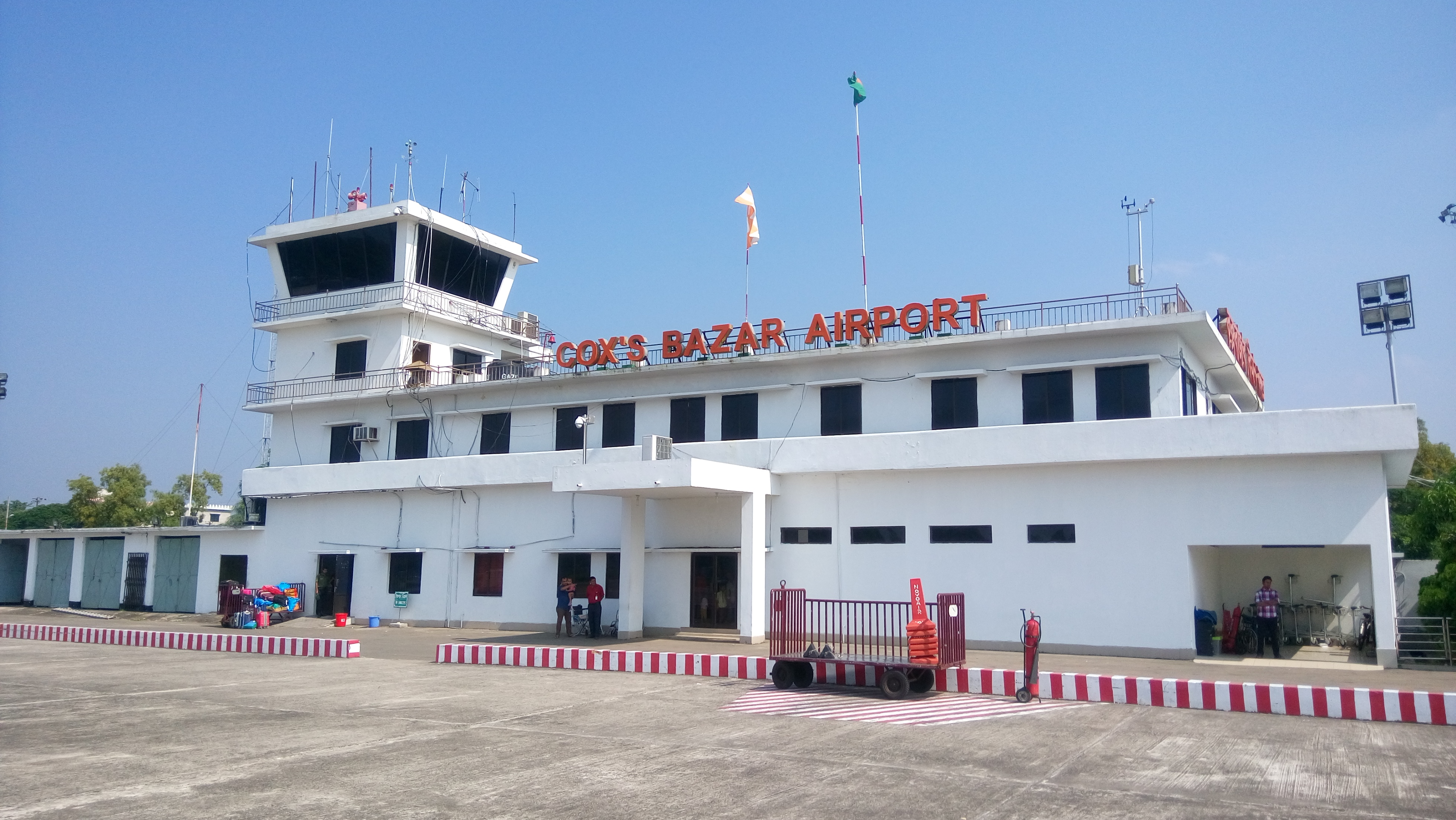 কক্সবাজার বিমানবন্দর